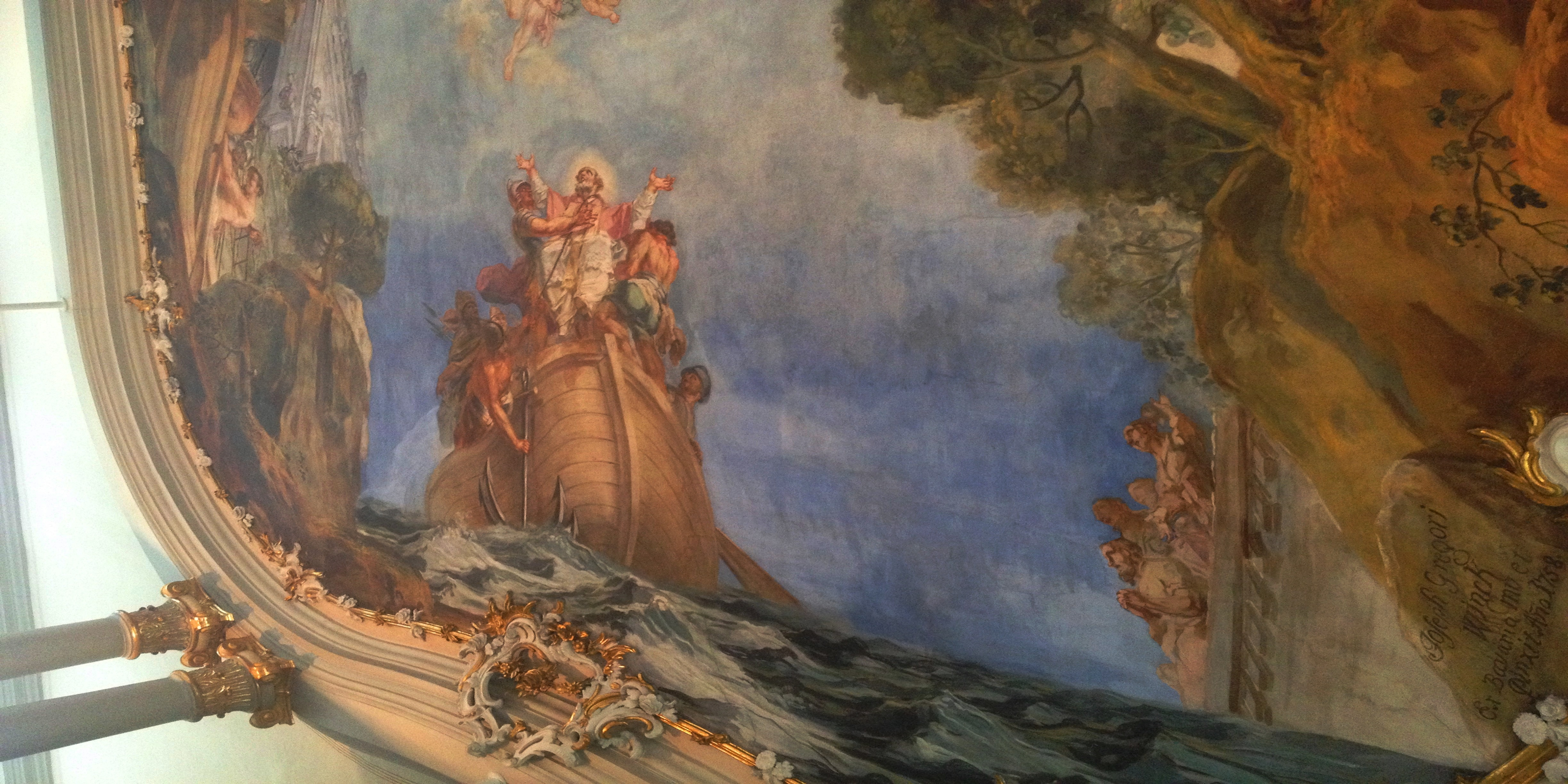 Liebenburg, Schlosskirche Mariä Verkündigung, Detail des Deckengemäldes mit Szenen aus der St.-Clemens-Legende, hier: der hl. Clemens auf dem Schwarzen Meer vor seiner Versenkung mit dem Anker.